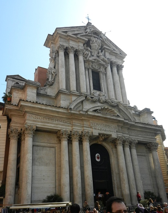 Roma - Chiesa dei Ss. Vincenzo e Anastasio